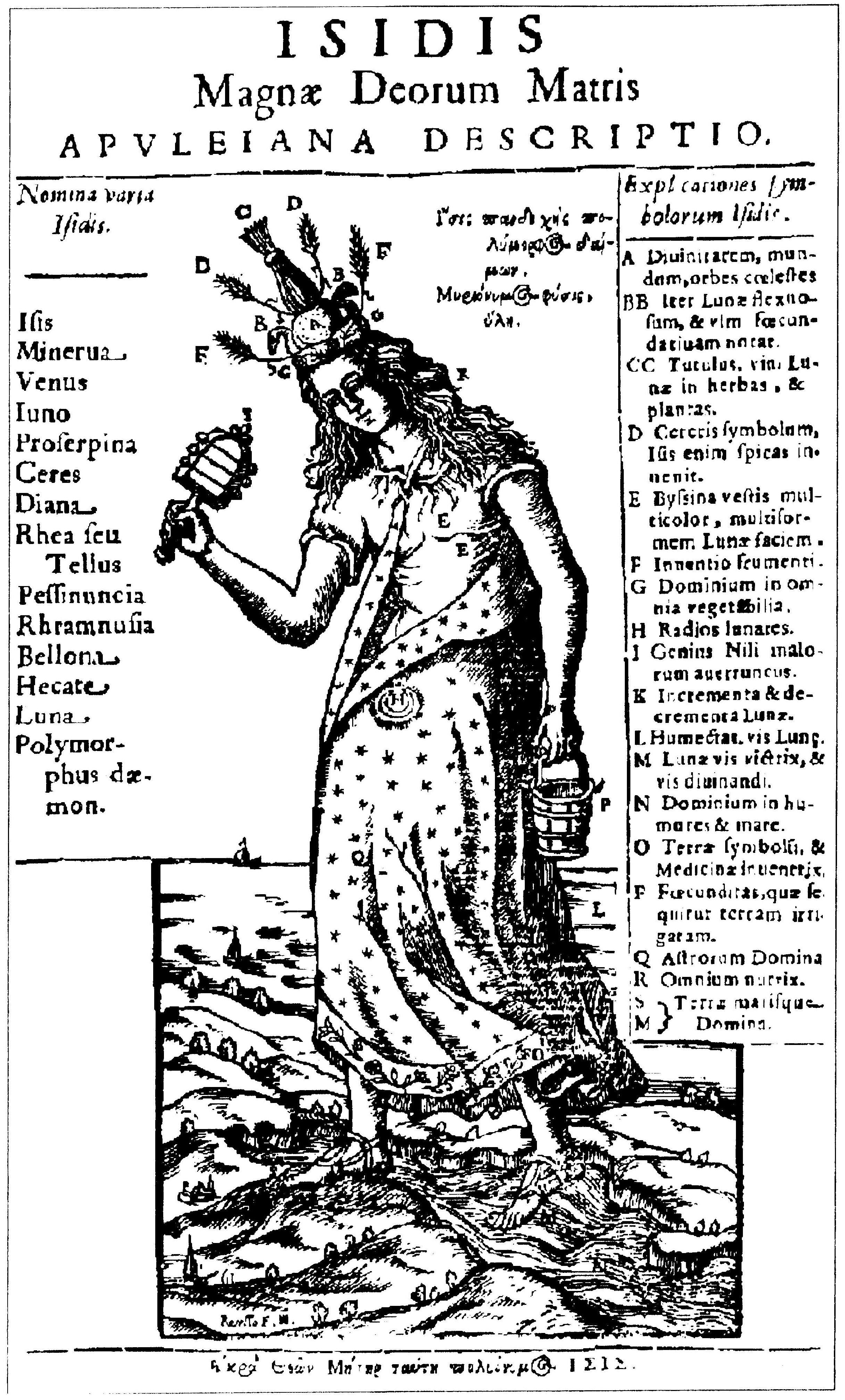 Bohyně Isis (egyptská Eset) v renesančním pojetí